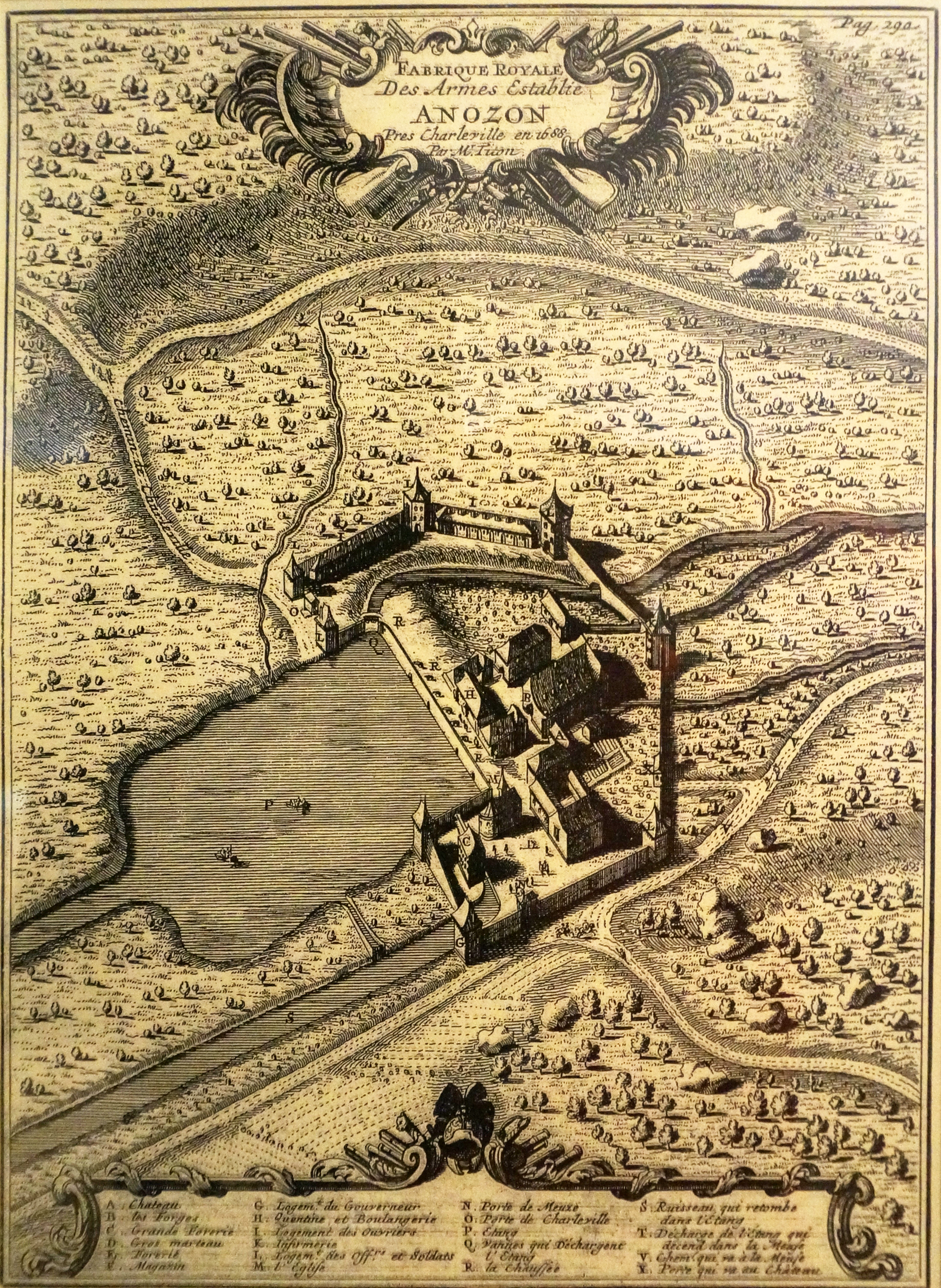 Plan de l'usine d'armes de Nouzonville .